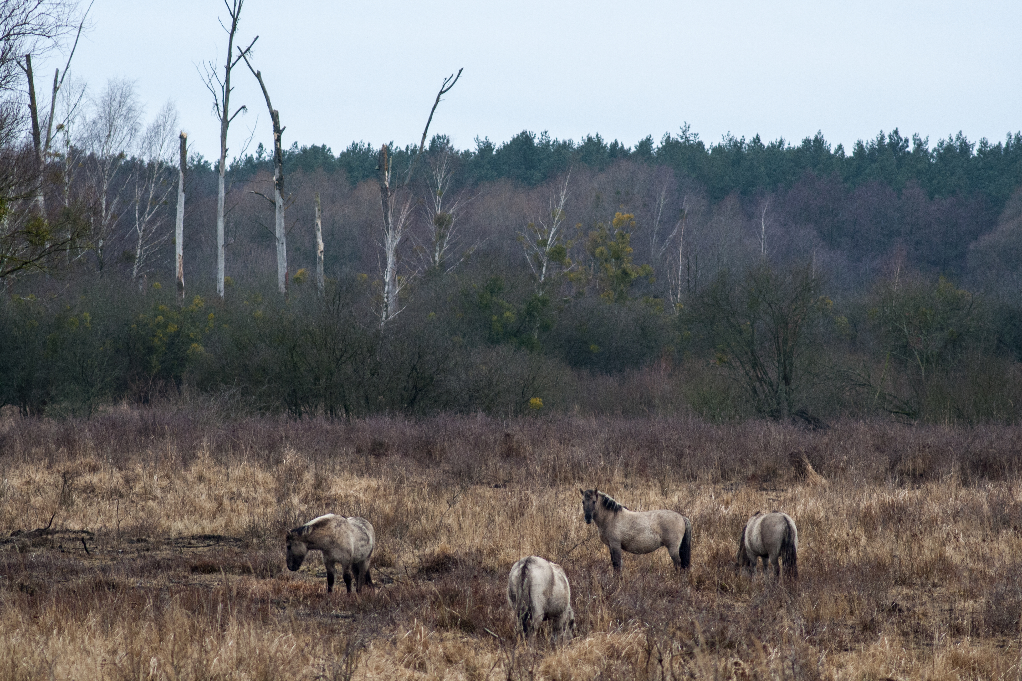 Konikpferde in der Naturerlebnisringzone der Döberitzer Heide